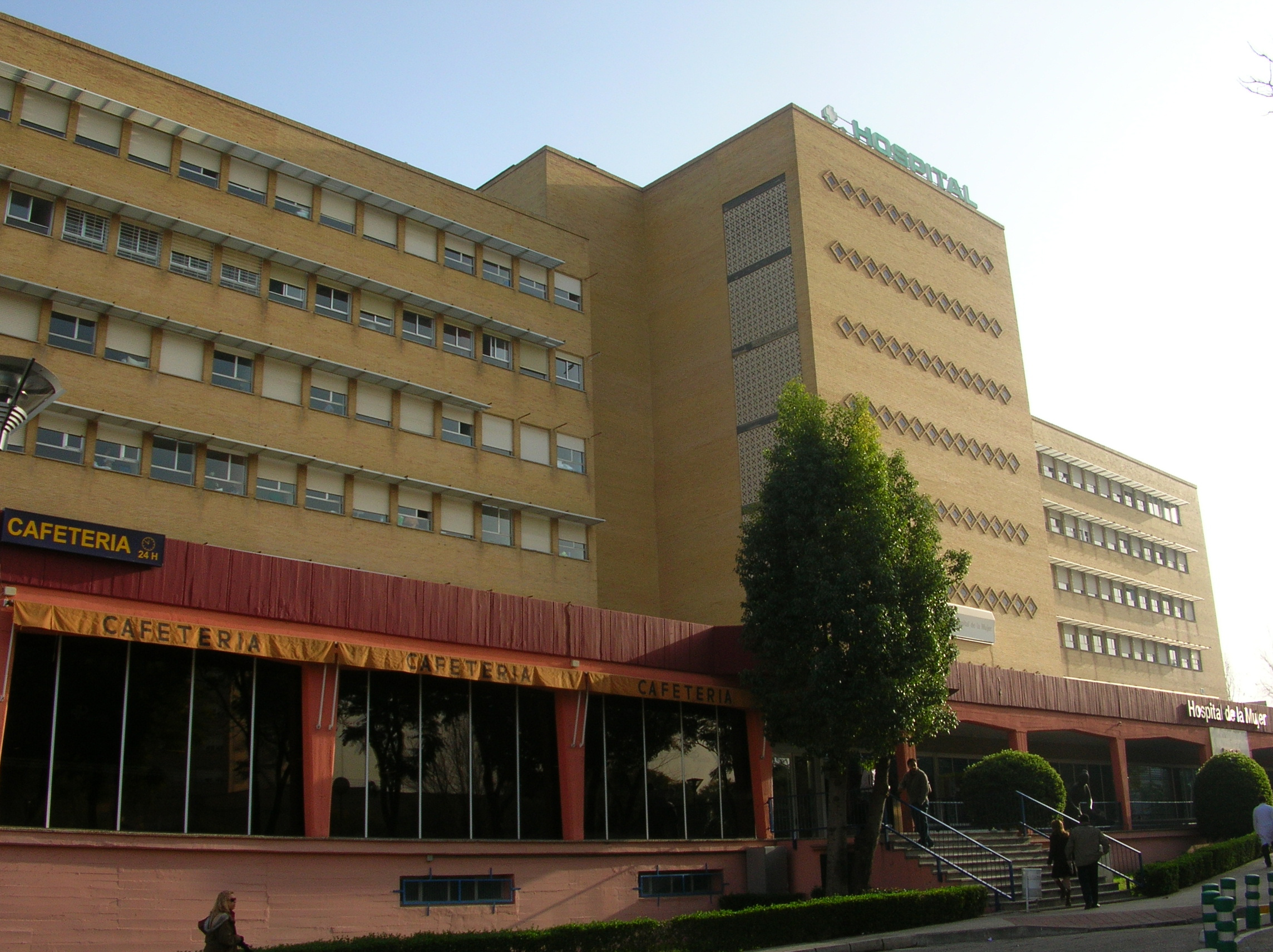 Hospital de la Mujer de los Hospitales Virgen del Rocío, Sevilla